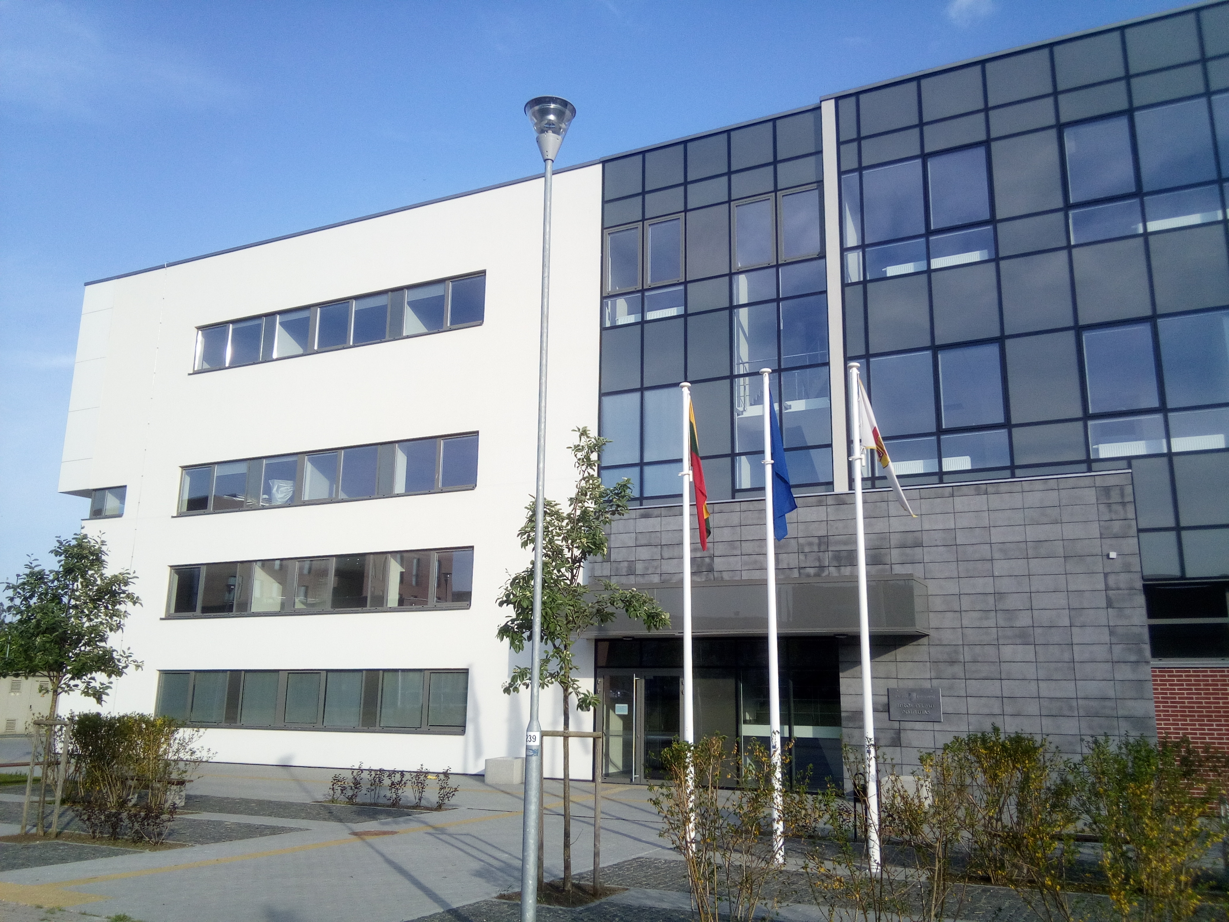 Klaipėdos universiteto jūros tyrimų institutas